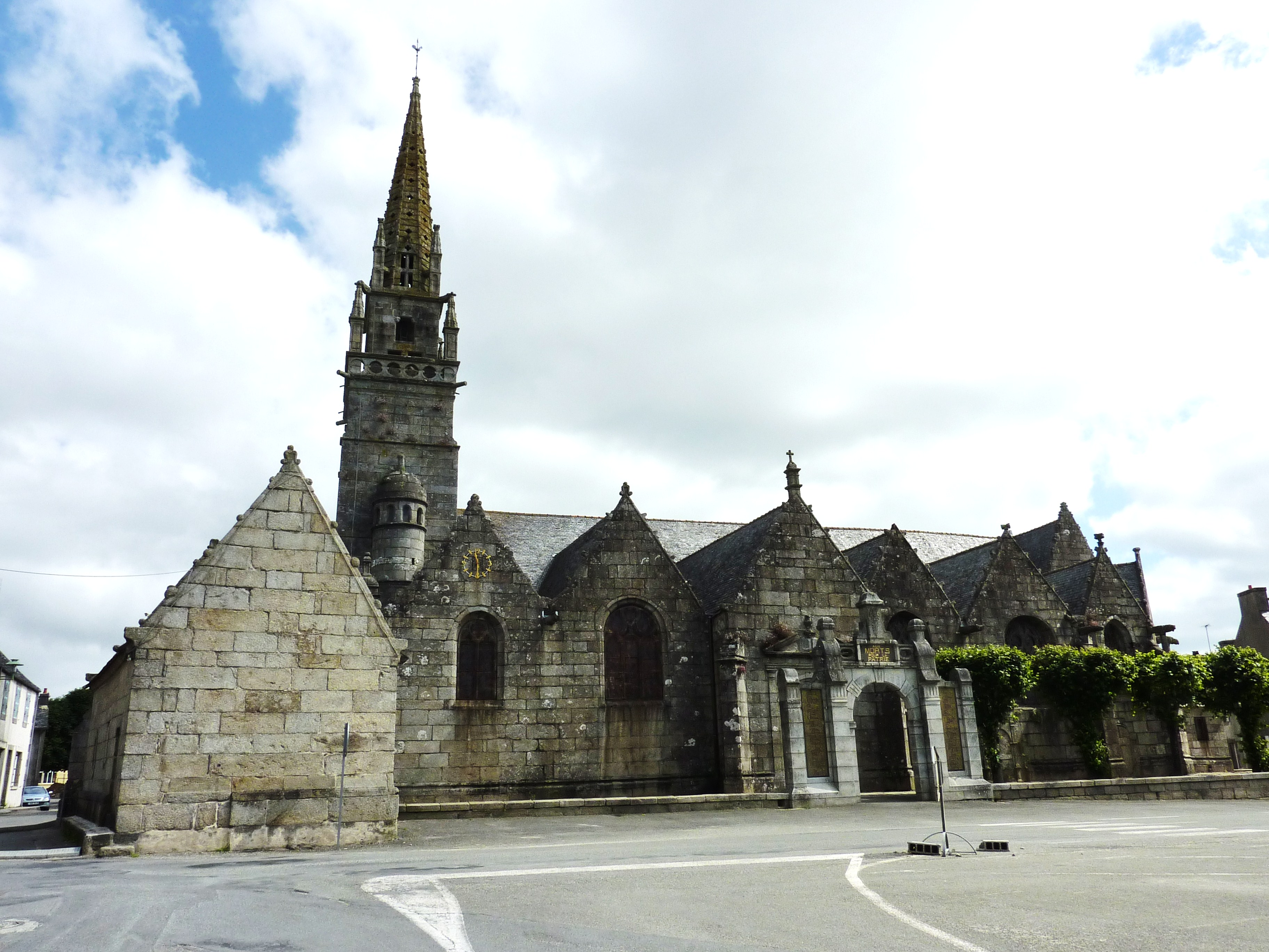 Pleyber-Christ: l'église paroissiale vue du sud